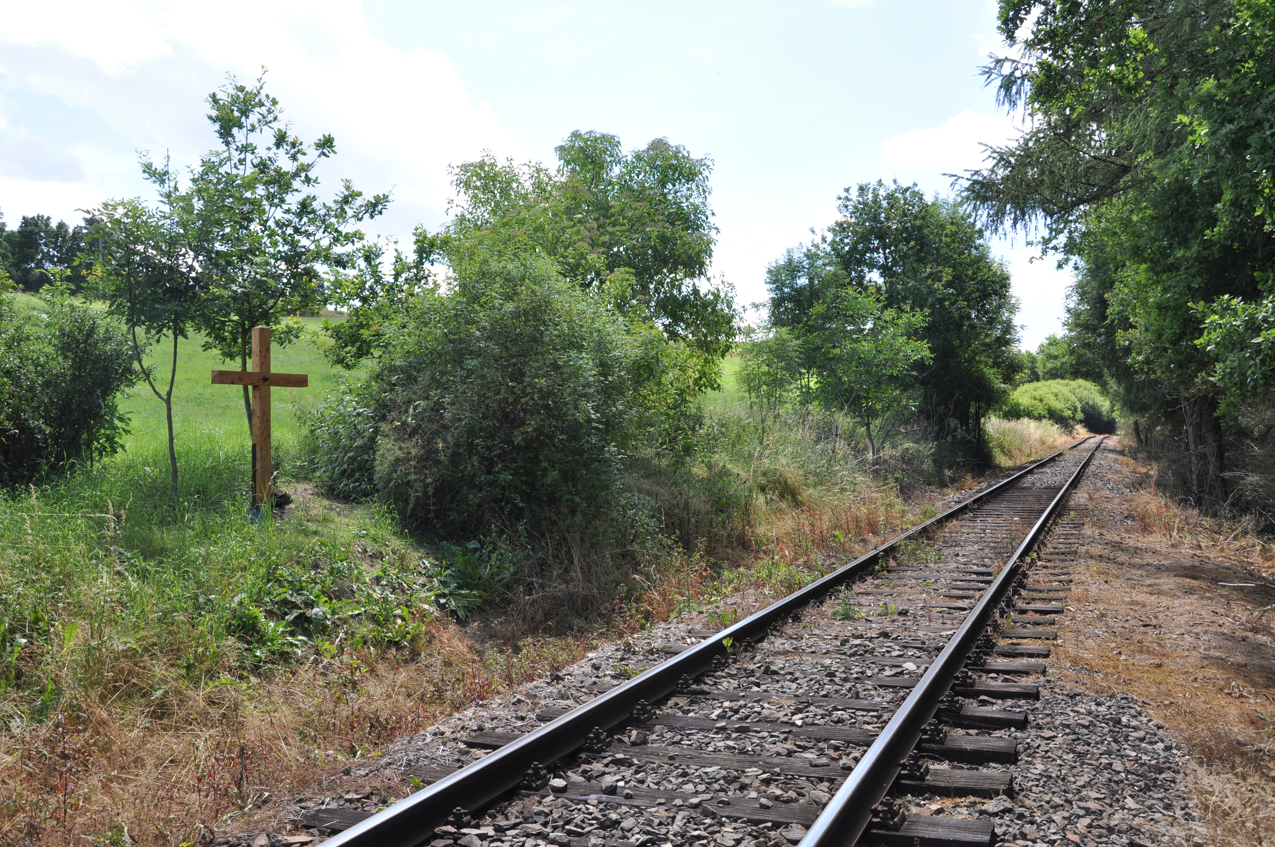 Holzkreuz am Ort des Eisenbahnunfalles vom 21. April 1945 in Běleč, Bahnstrecke Zadní Třebaň–Lochovice